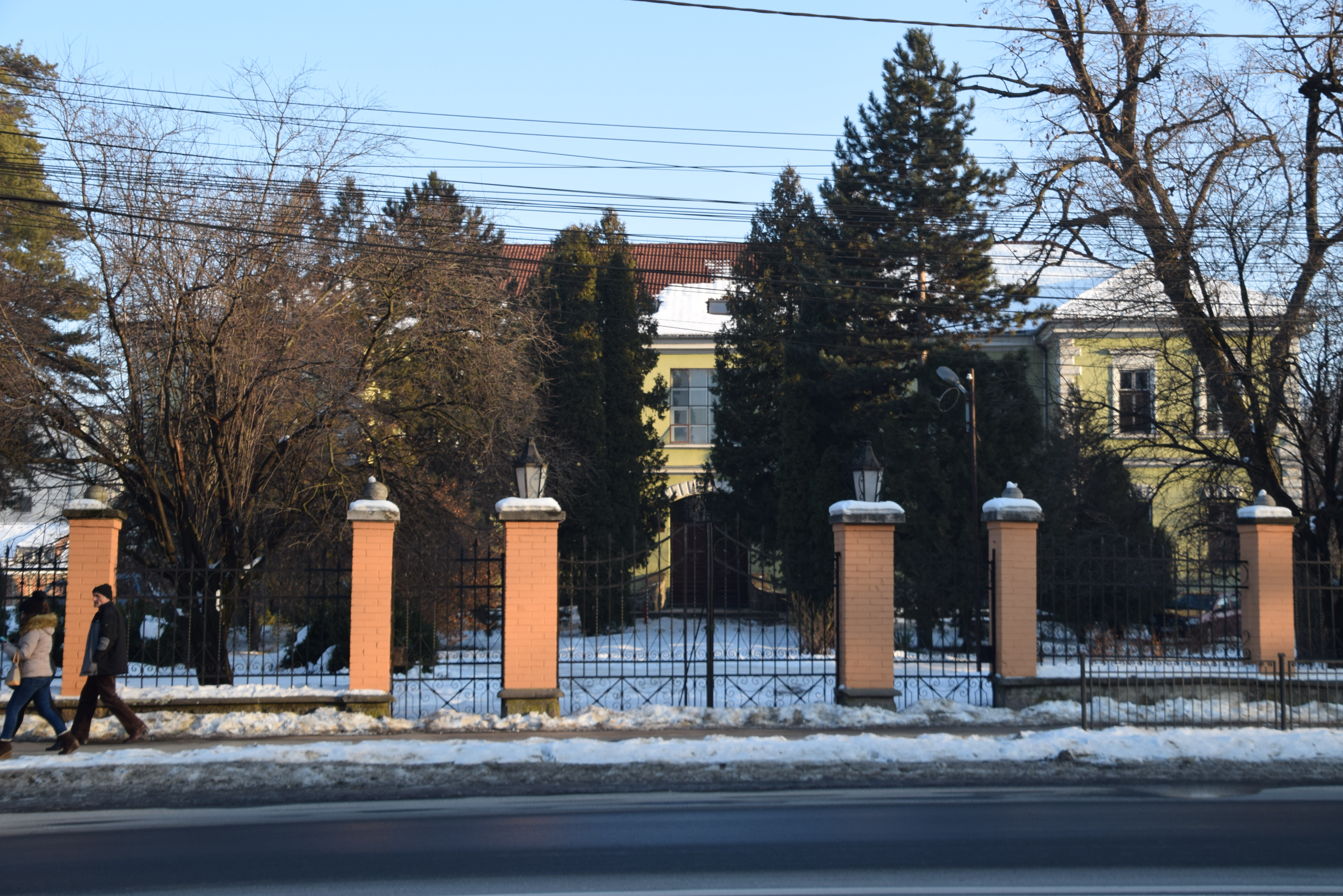 Spitalul orășenesc